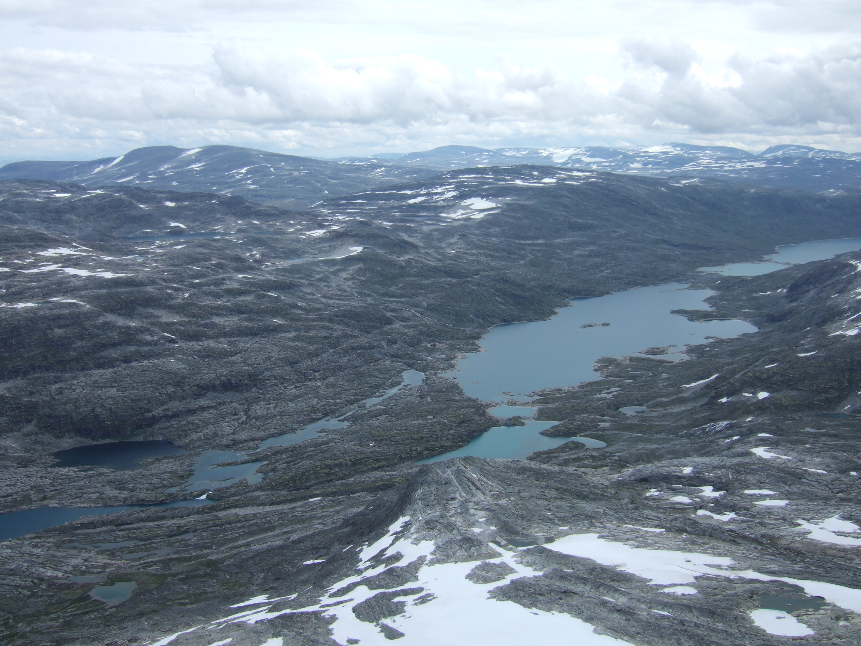 Vikvatnet (also called Vikvatnet) is a lake in Norddal municipality in Møre og Romsdal. It is reaervoar for Tafjord 6 power plant. Vikvatnet was originally two separate lakes, Heimste Vikvatnet in north, and the greater Fremste Vikvatnet south.